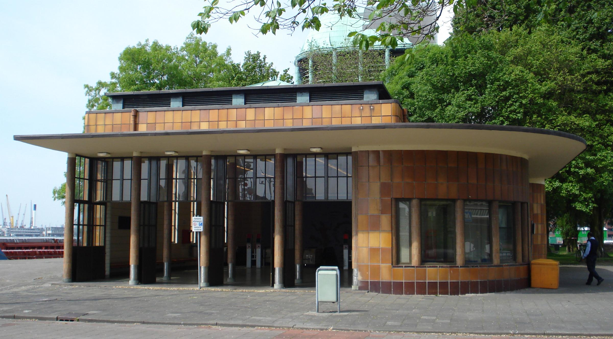 Rotterdam, Maastunnel, Toegangsgebouw.